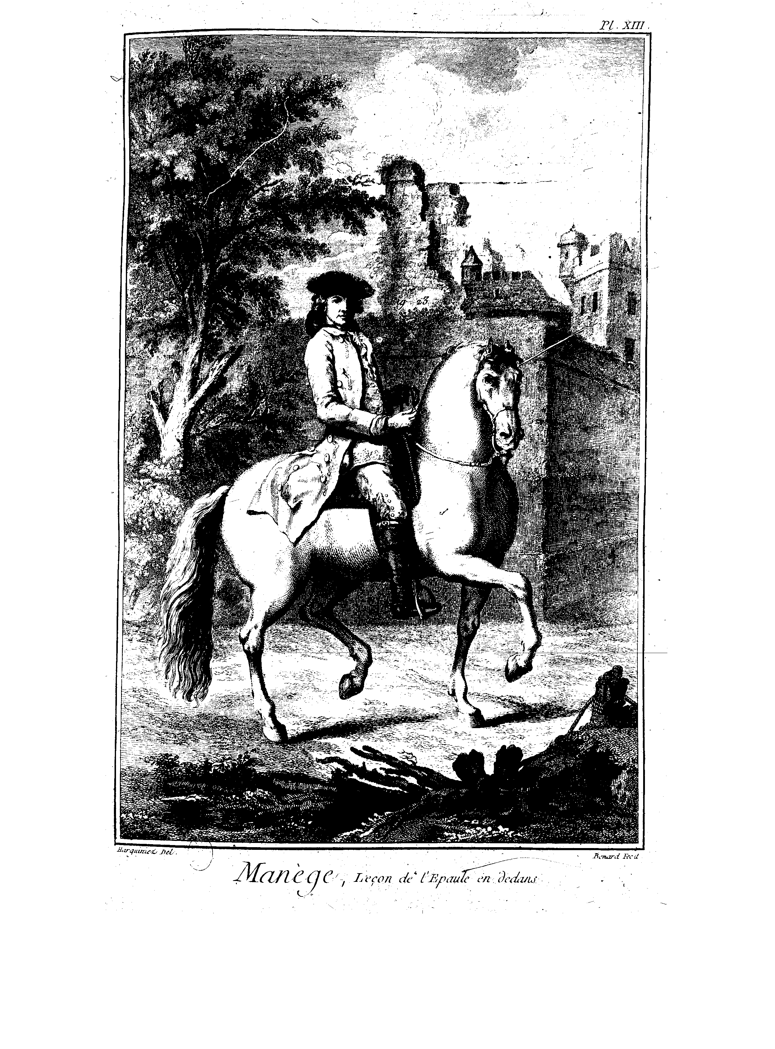 Planches de l'Encyclopédie de Diderot et d'Alembert, volume 6